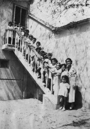 En la sede de entre las equins de Conde y Piñango en Caracas - Venezuela